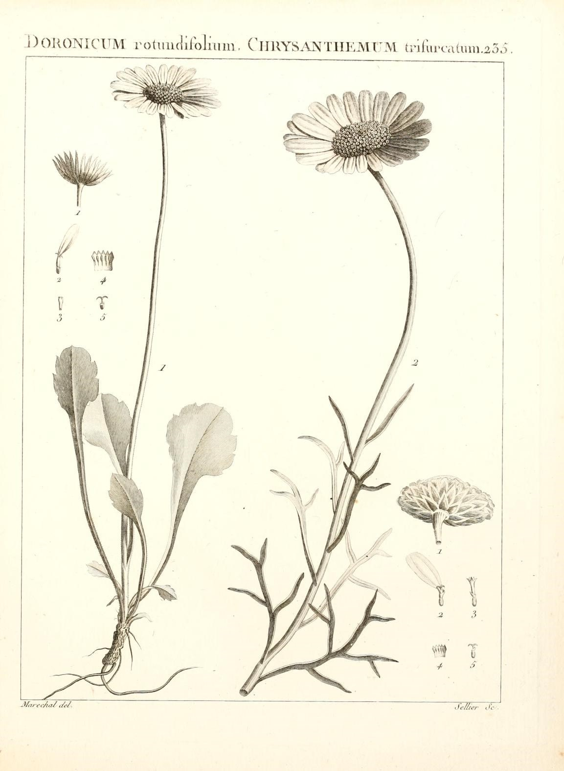 .)OKONICUM rotmioSiolnim, ClJllYSANTHEMUM trifurcatum.^35, V V 1 / ^ J/nrec/la/ ae/. Oeuier tfc